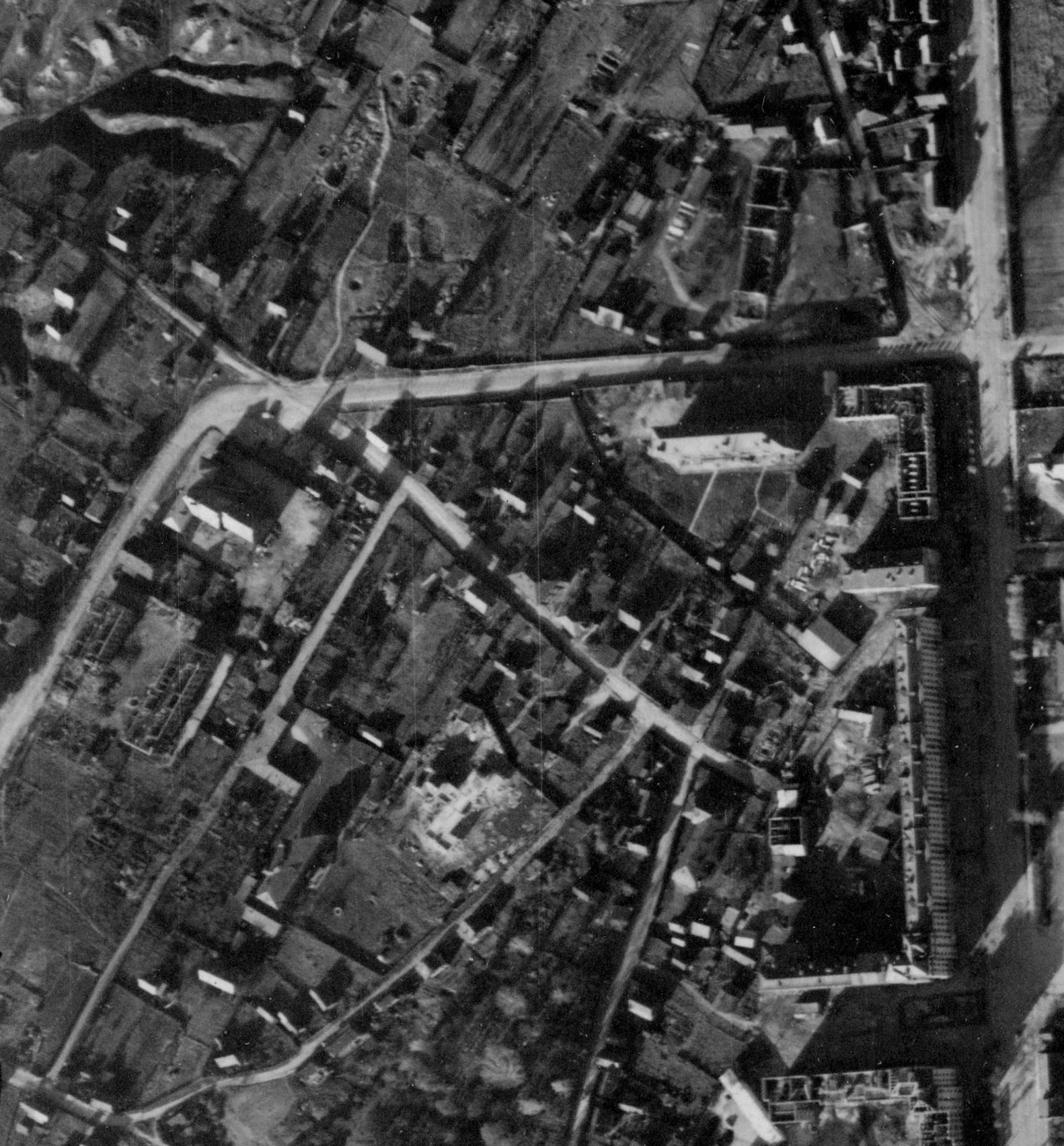 Магілёў. Нямецкі аэрафотаздымак